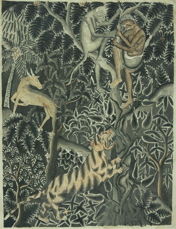 Aquarel. Een bos met een man en een aap in een boom, verderop een tijger en een hert